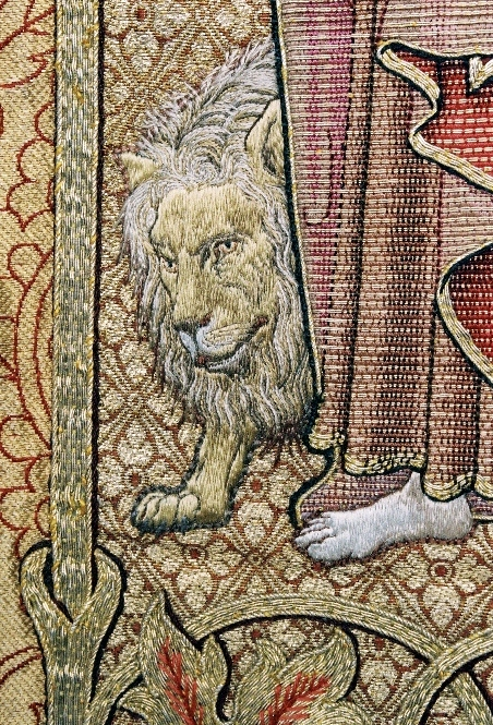 Detail kazuifel van C.H. de Vries, circa 1900.